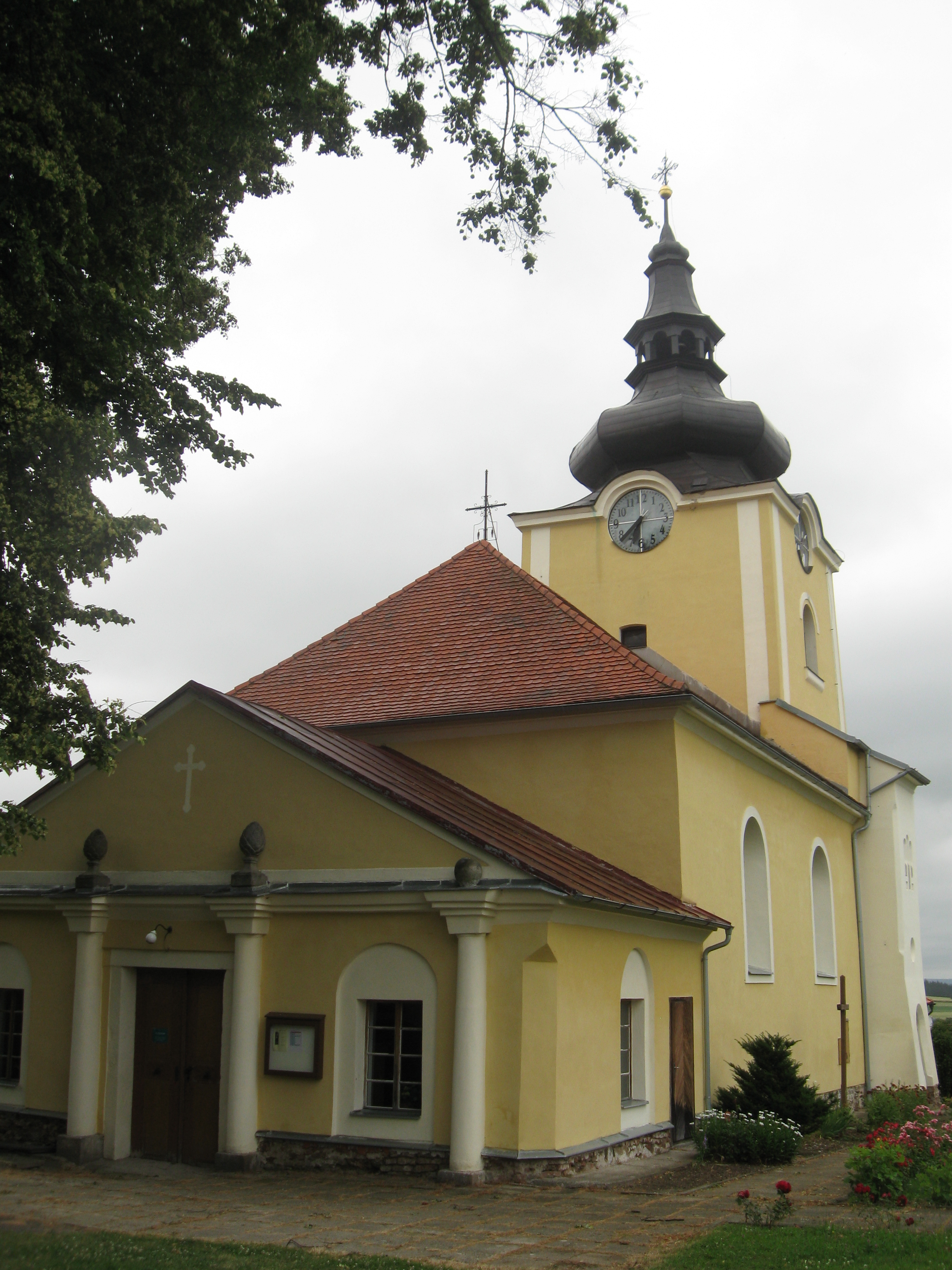 kostel svatého Jana Křtitele, Košetice